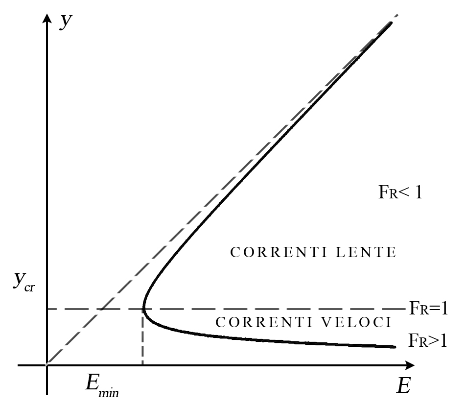 Grafico del carico specifico delle correnti dei fiumi